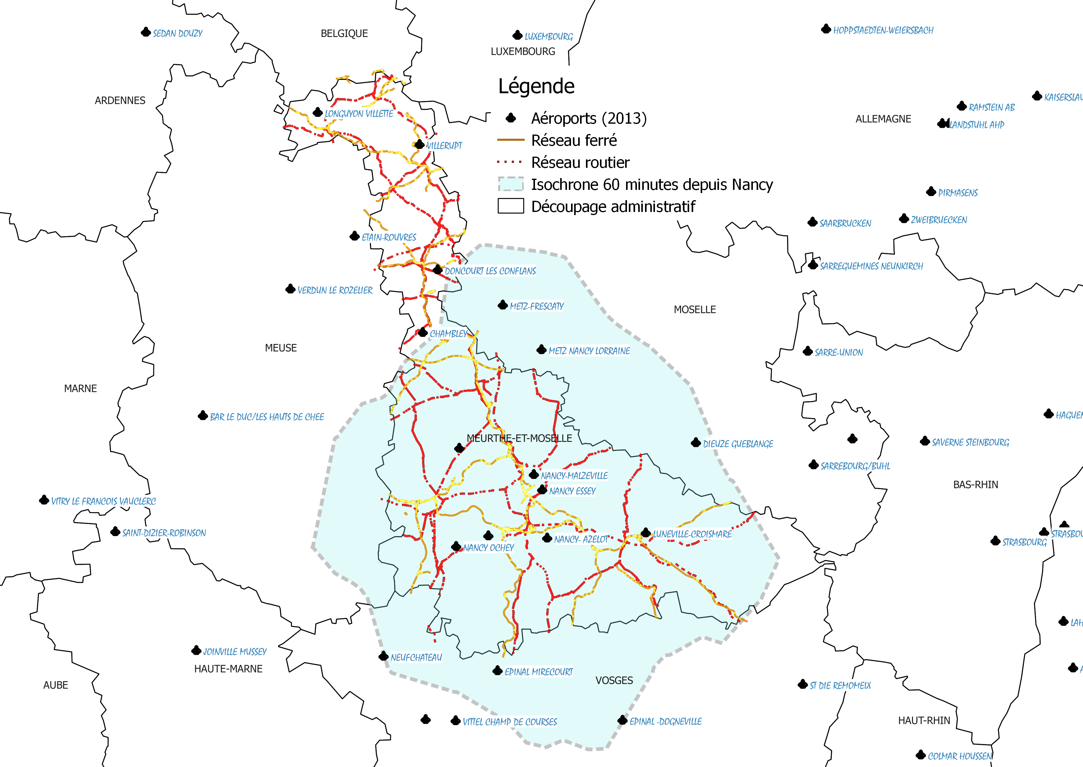 isochrone